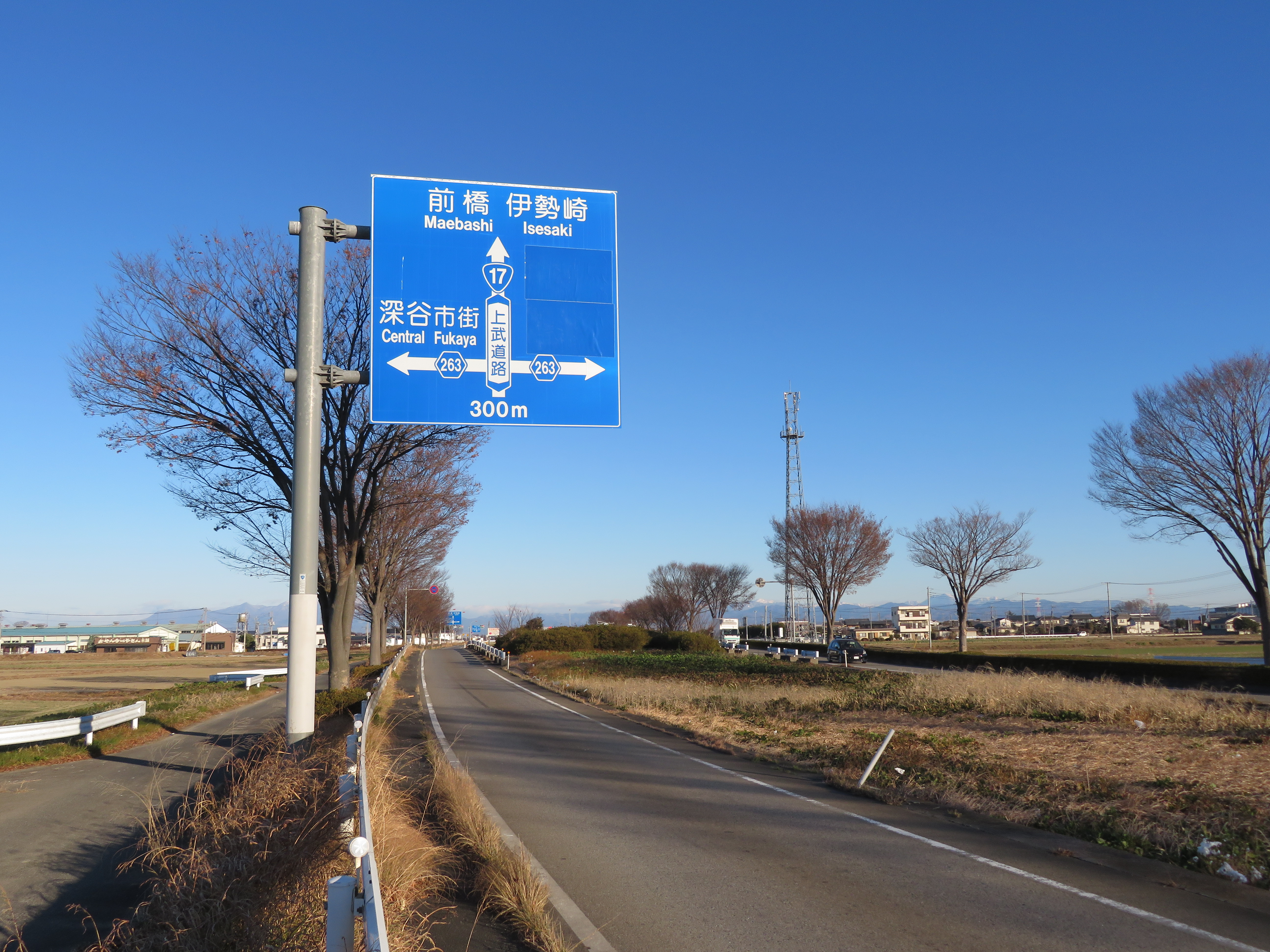 国道17号線上武道路埼玉県深谷市本田ケ谷付近（太田方面を撮影） Canon PowerShot SX720 HS